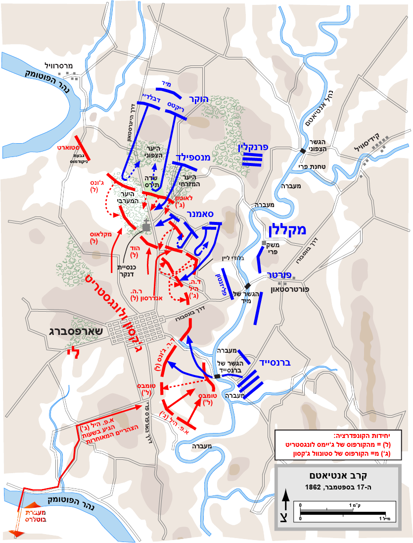 Map of the Battle of Antietam of the American Civil War. Drawn in Adobe Illustrator CS5 by Hal Jespersen. Graphic source file is available at